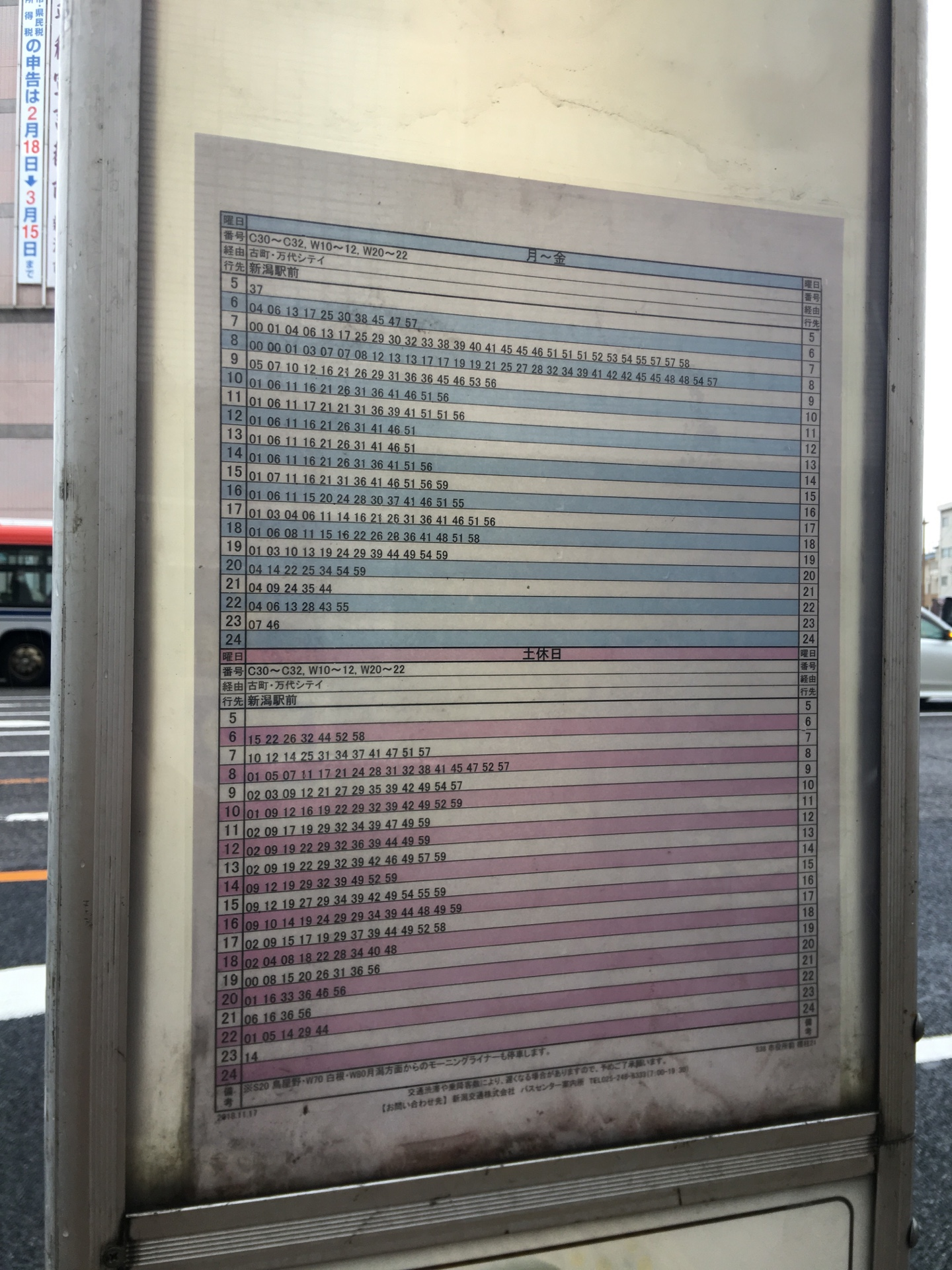 新潟交通 W2 西小針線などが通るバス停（市役所前、2019年3月4日）